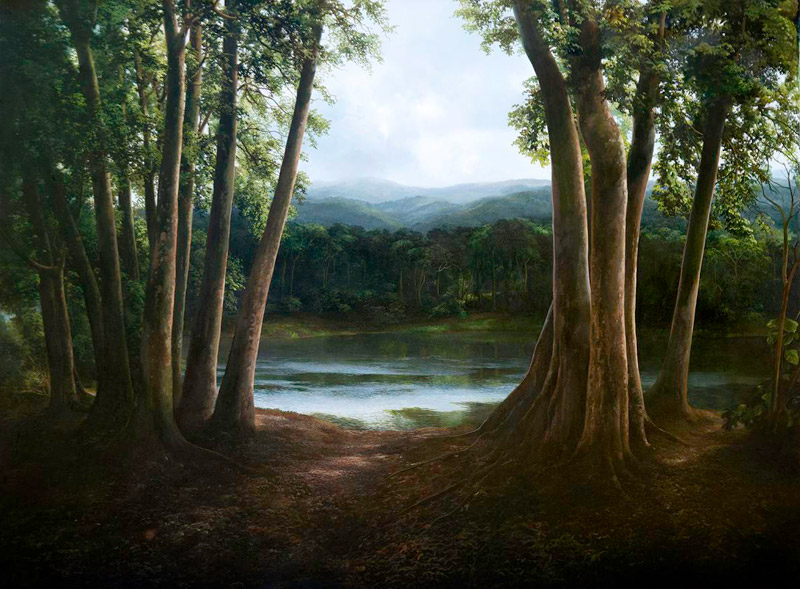 S/T, 2010, óleo sobre lienzo, 114 x 164 cm.